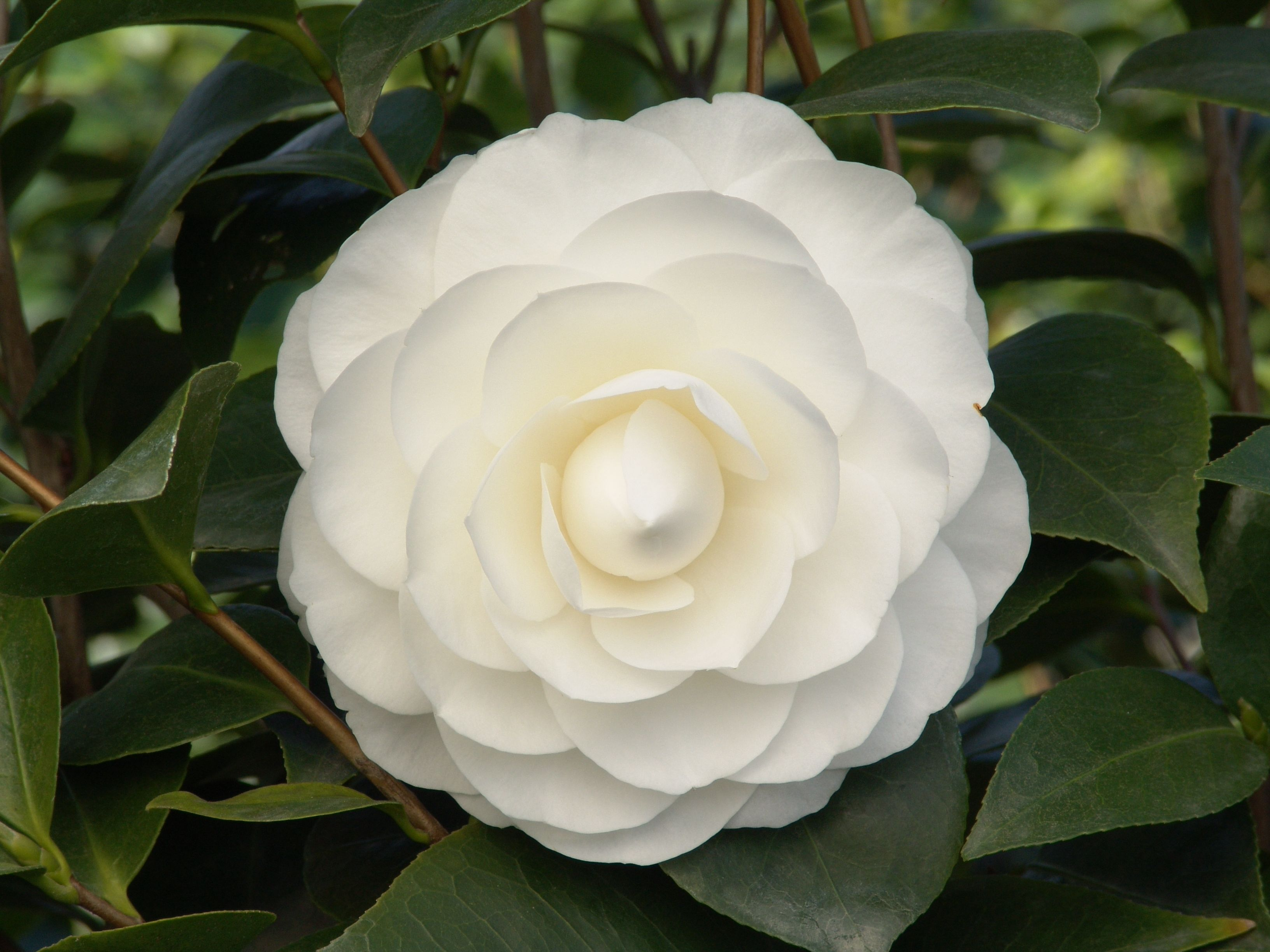 Balta japoninė kamelija (geliurojus.lt medžiaga)